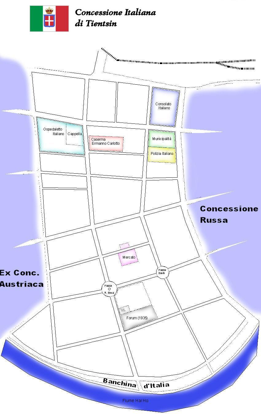 中文（中国大陆）: 天津意租界道路图